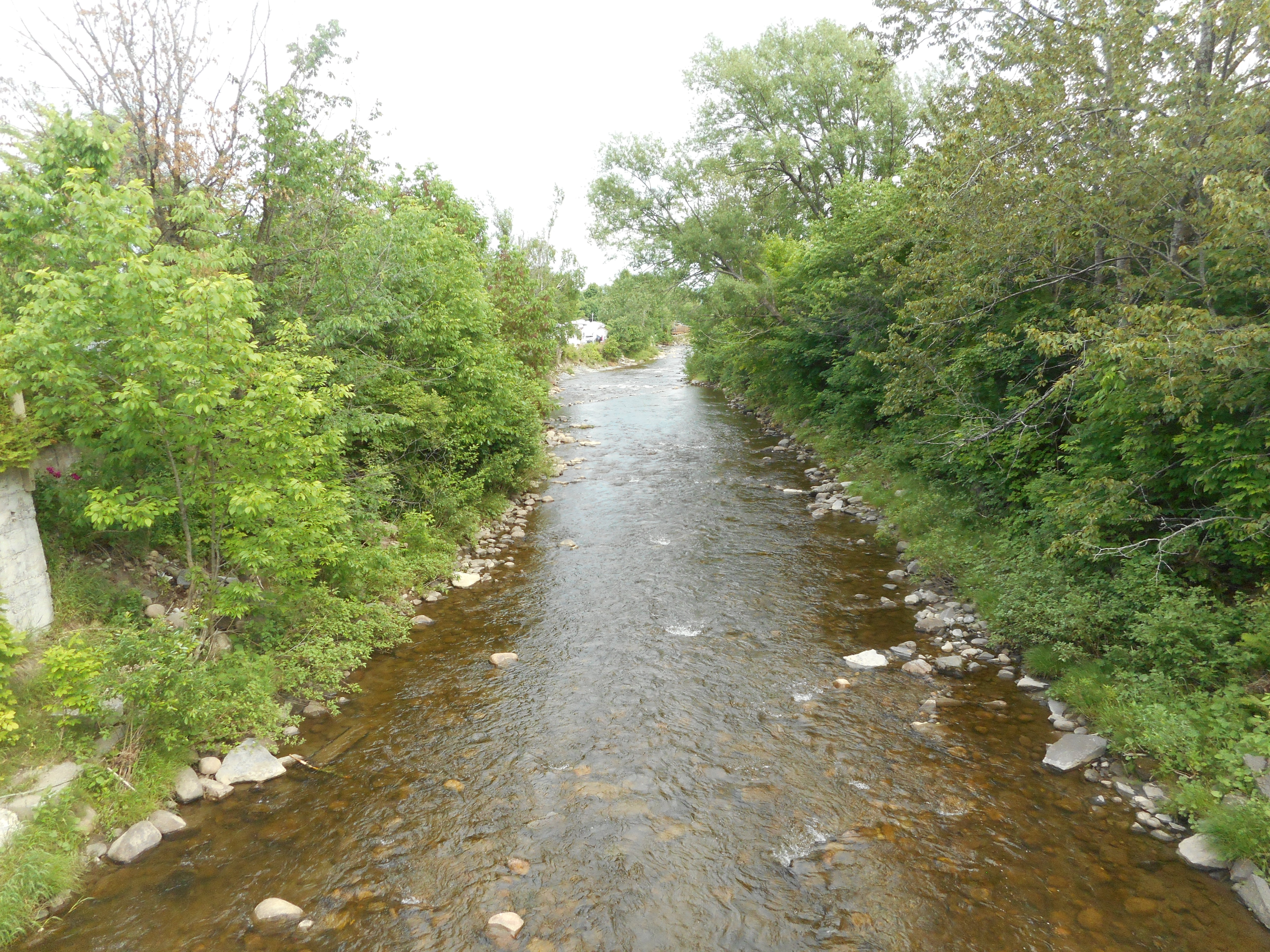 La rivière aux Chiens sert de limite entre Beaupré et Château-Richer. Vue du pont de la route 360, regardant vers l'aval (le sud-est)